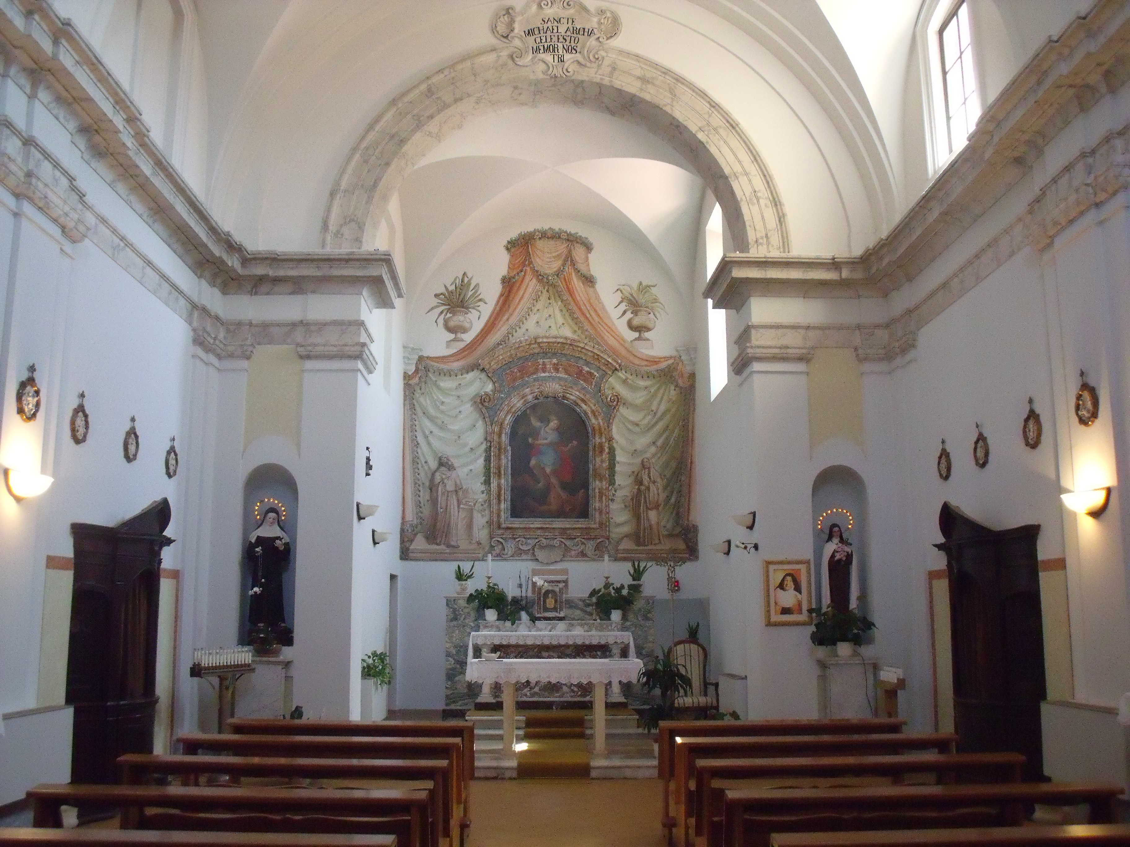 Cerveteri, interno della chiesa di San Michele Arcangelo.